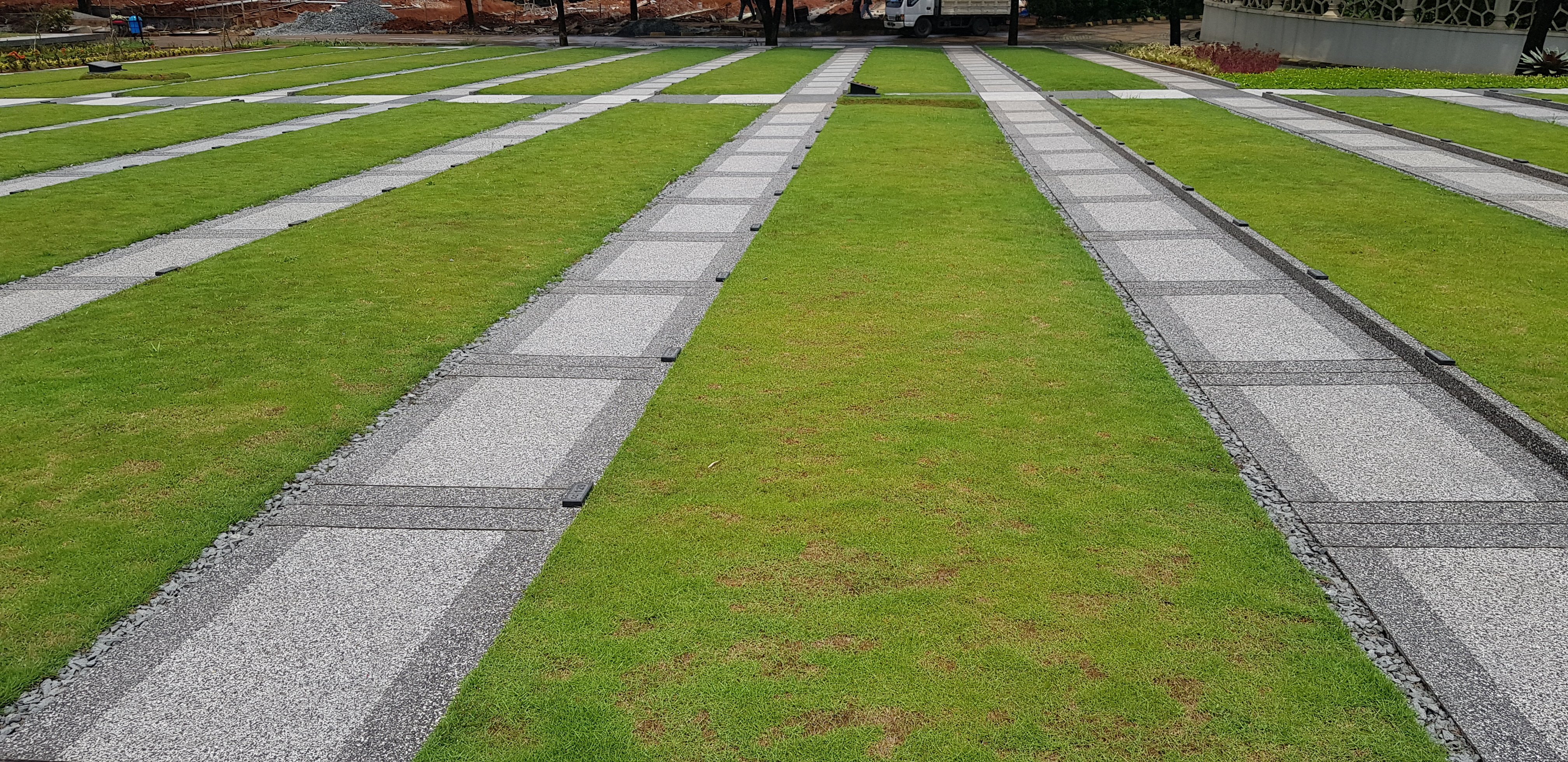 Al-Azhar Memorial Garden dengan walkway dan tata letak penomeran. Sehingga makam tidak terlangkahi, terduduk atau terinjak